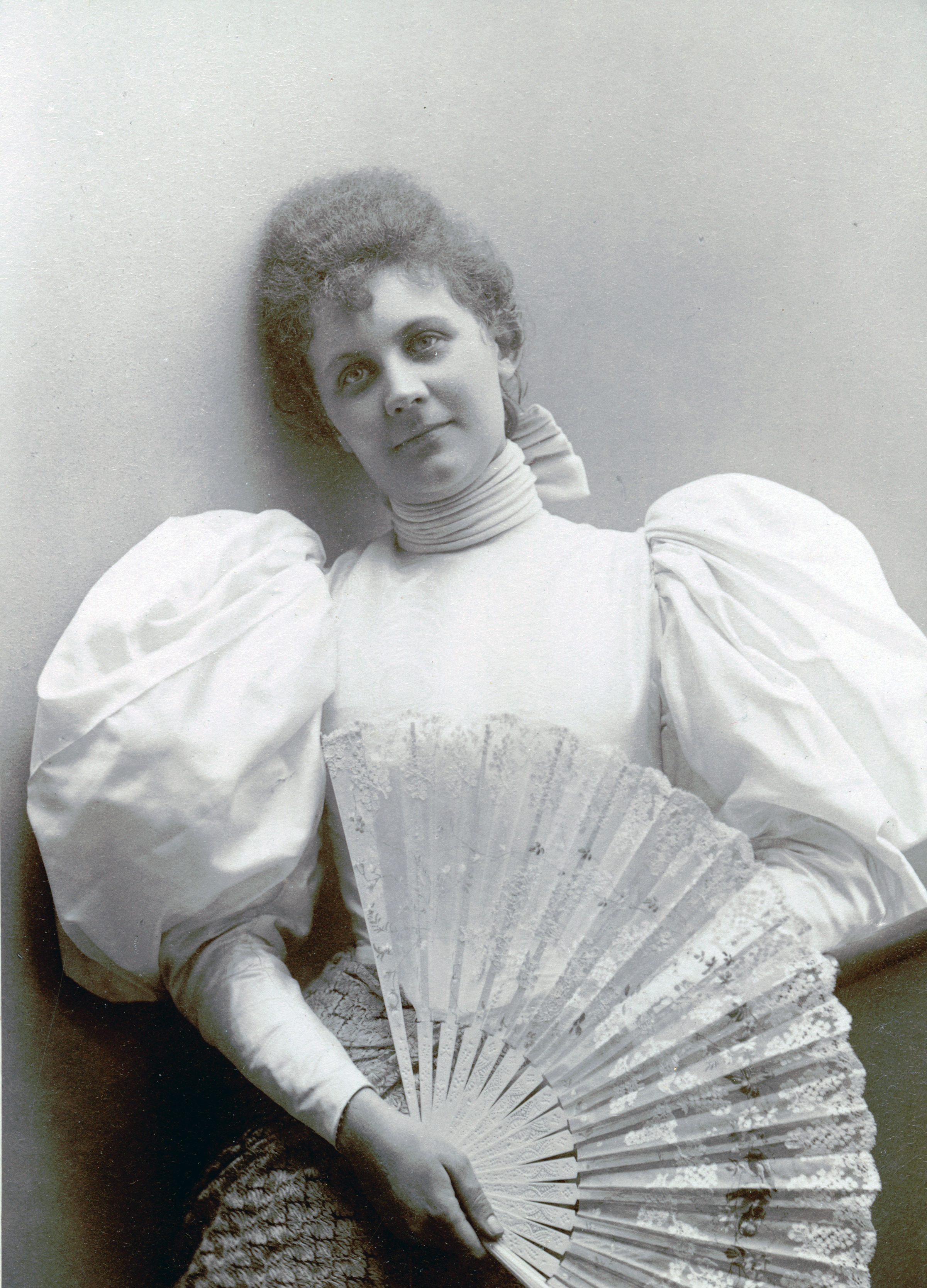 Eva Hamrin (gift Nyblom), skådespelare vid Kungliga Dramatiska teatern 1896-97